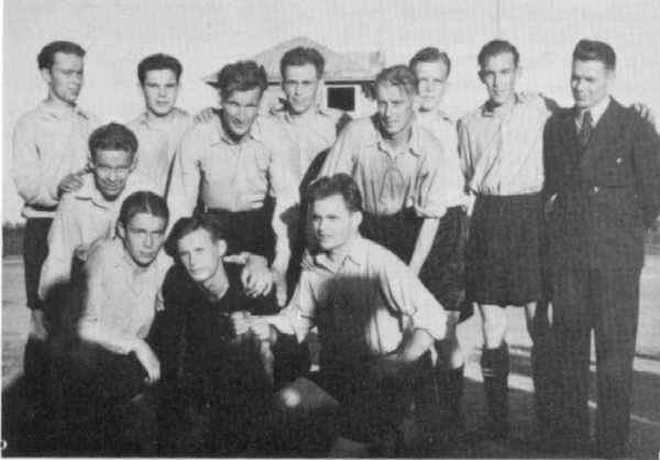 KuPS in 1947